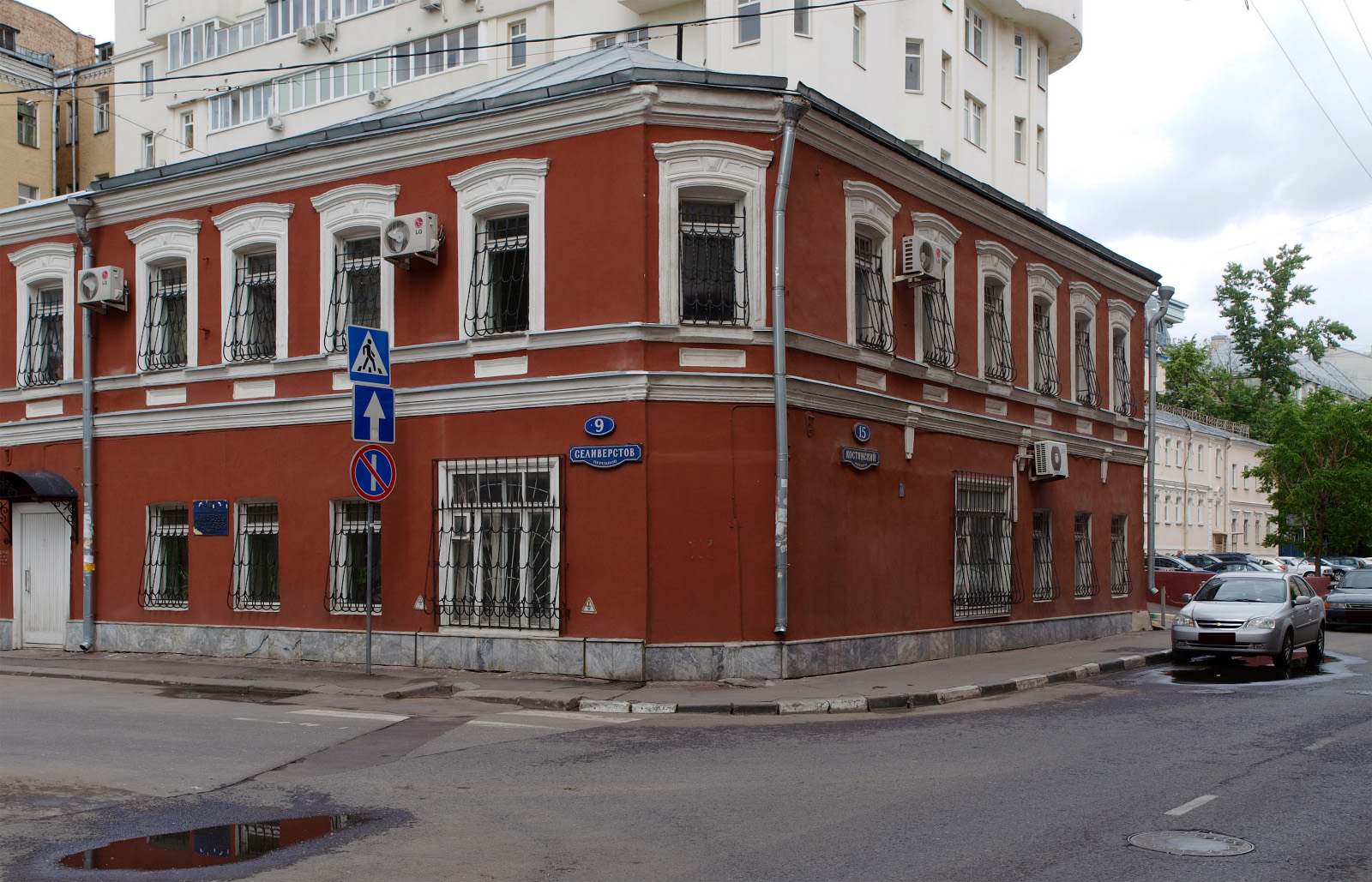 Костянский переулок 15 / Селиверстов 9, Москва.